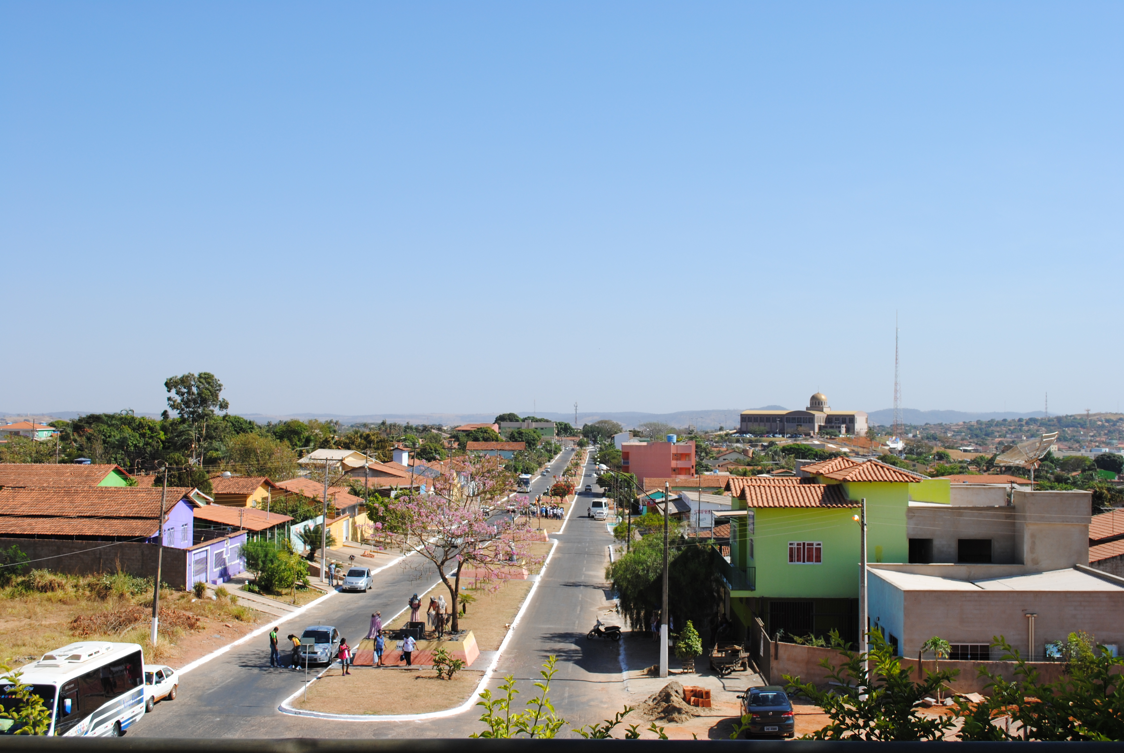 Visão de grande parte da cidade de Trindade, Goiás, Brasil. Vista a partir da Igreja Padre Pelágio.